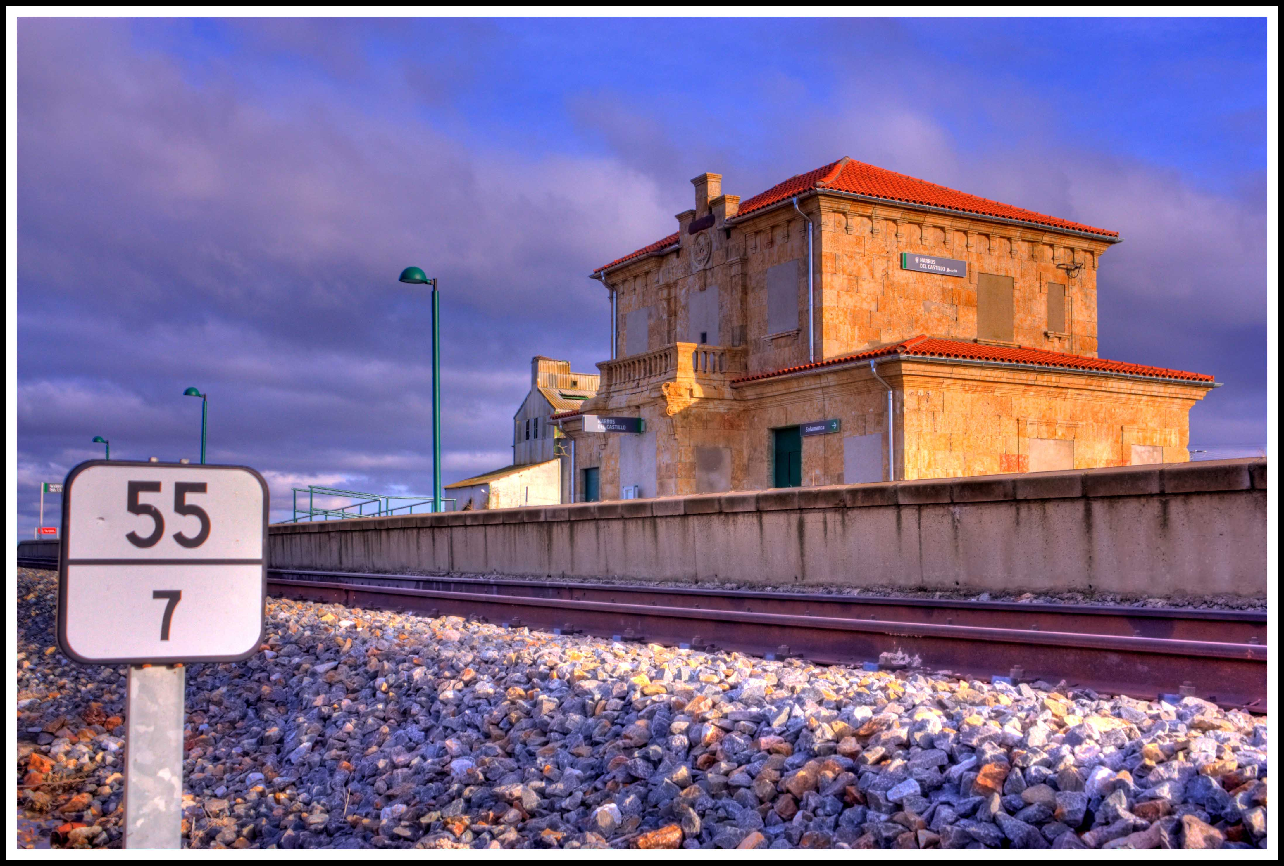 Estacion Narros 55,7